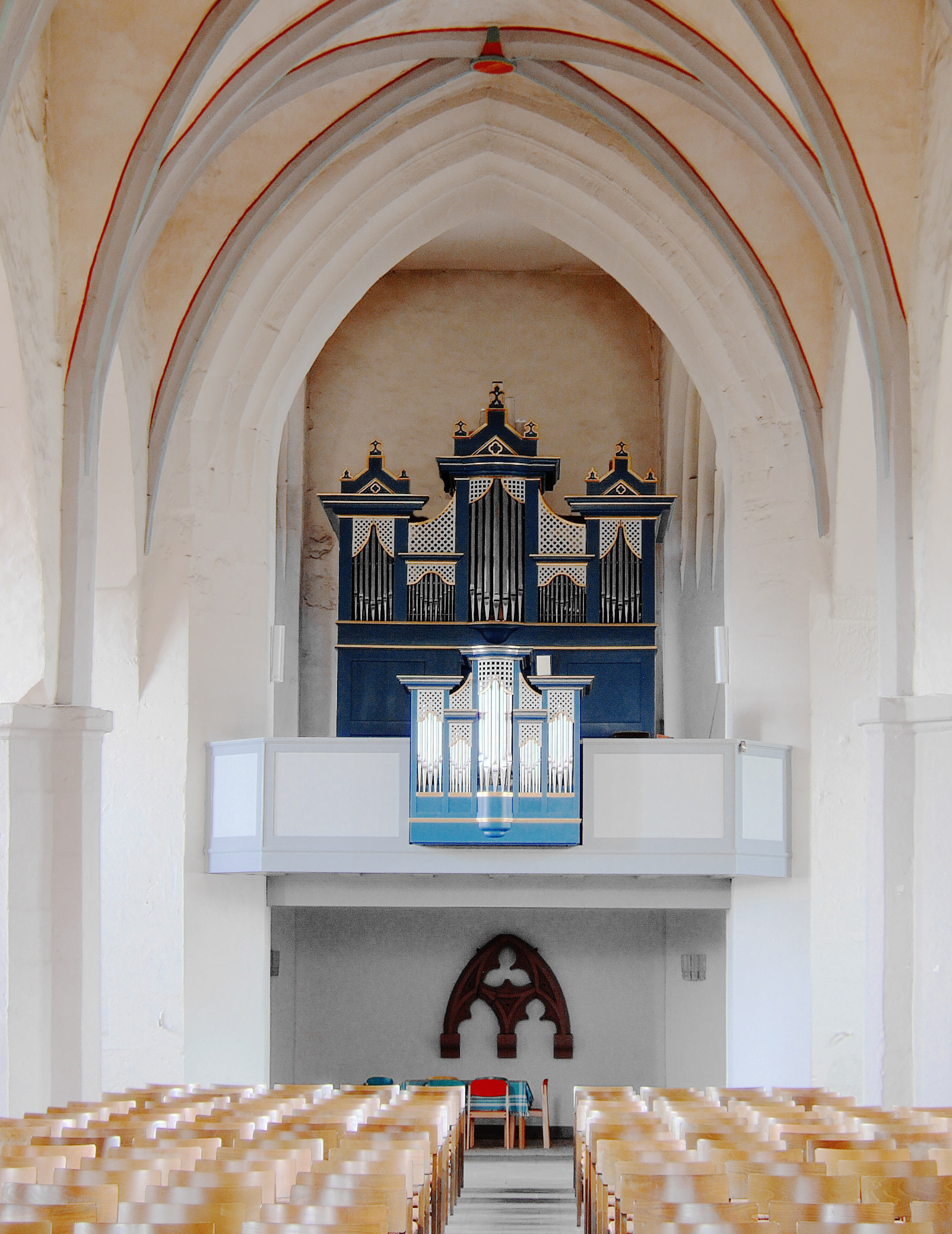 Klosterorgel in Göttingen, Nikolausberg